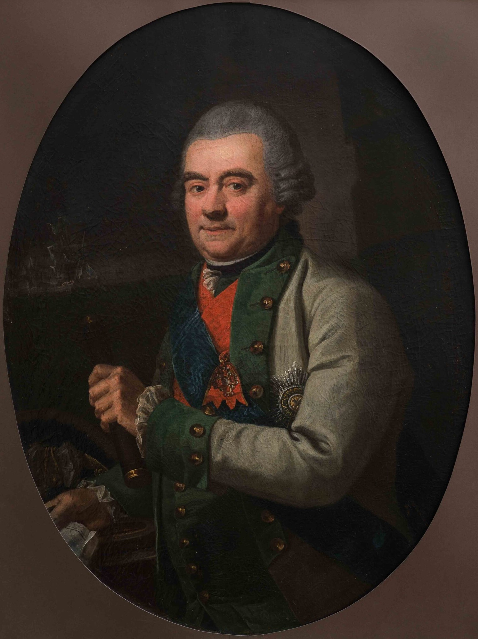 Адмирал Григорий Андреевич Спиридов